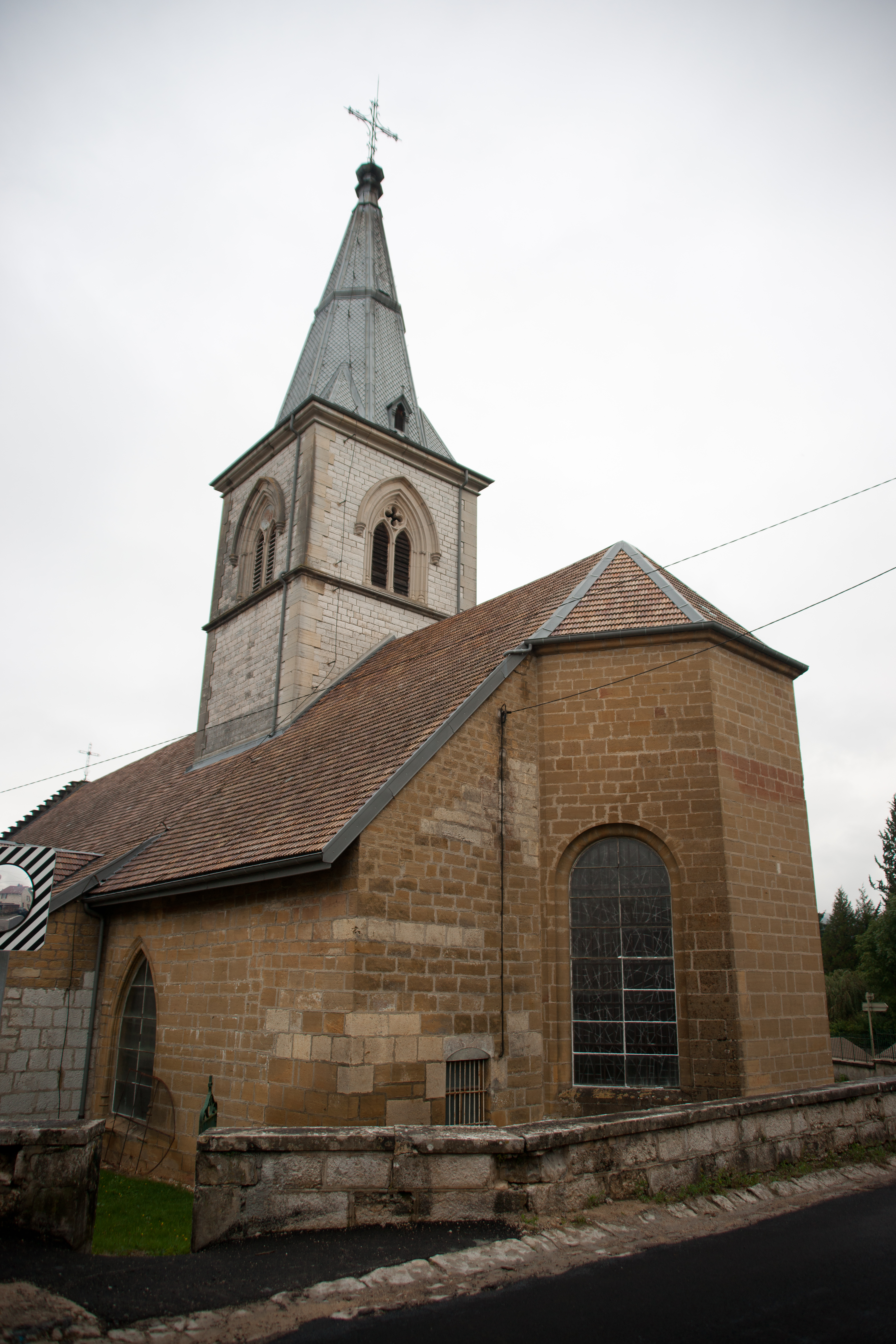 Église Saint-Étienne de Sirod .